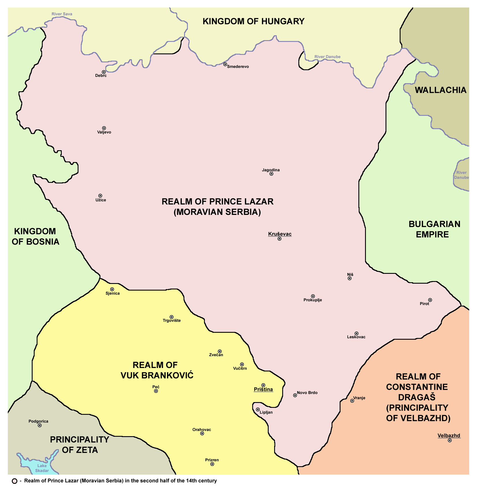 Moravian Serbia was one of the states that emerged from the collapse of the Serbian Empire in the 14th century.Моравска Србија је била једна од држава насталих распадом Српског царства у 14. веку.